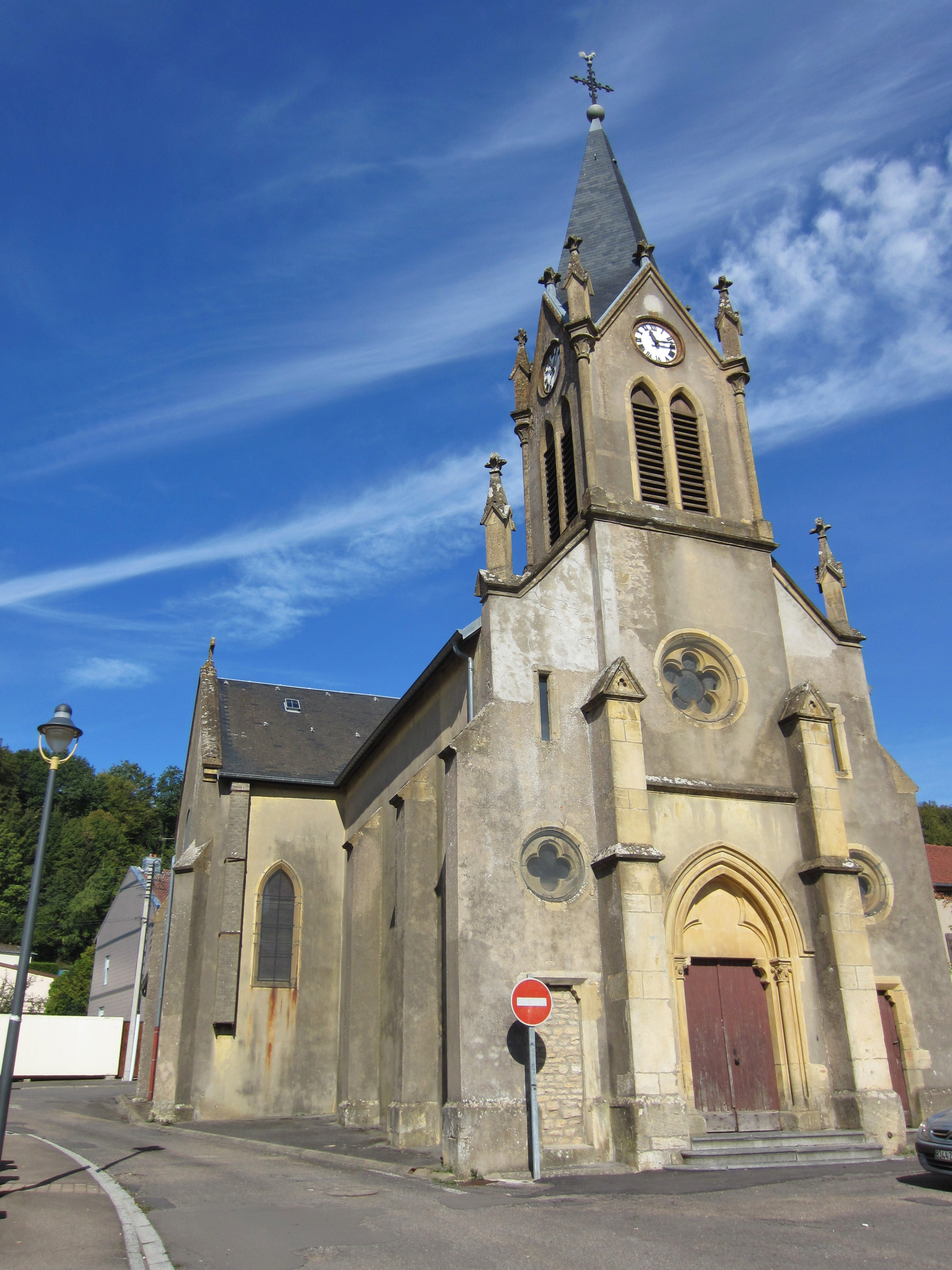 Description eglise saint léger Crusnes eglise saint léger Crusnes